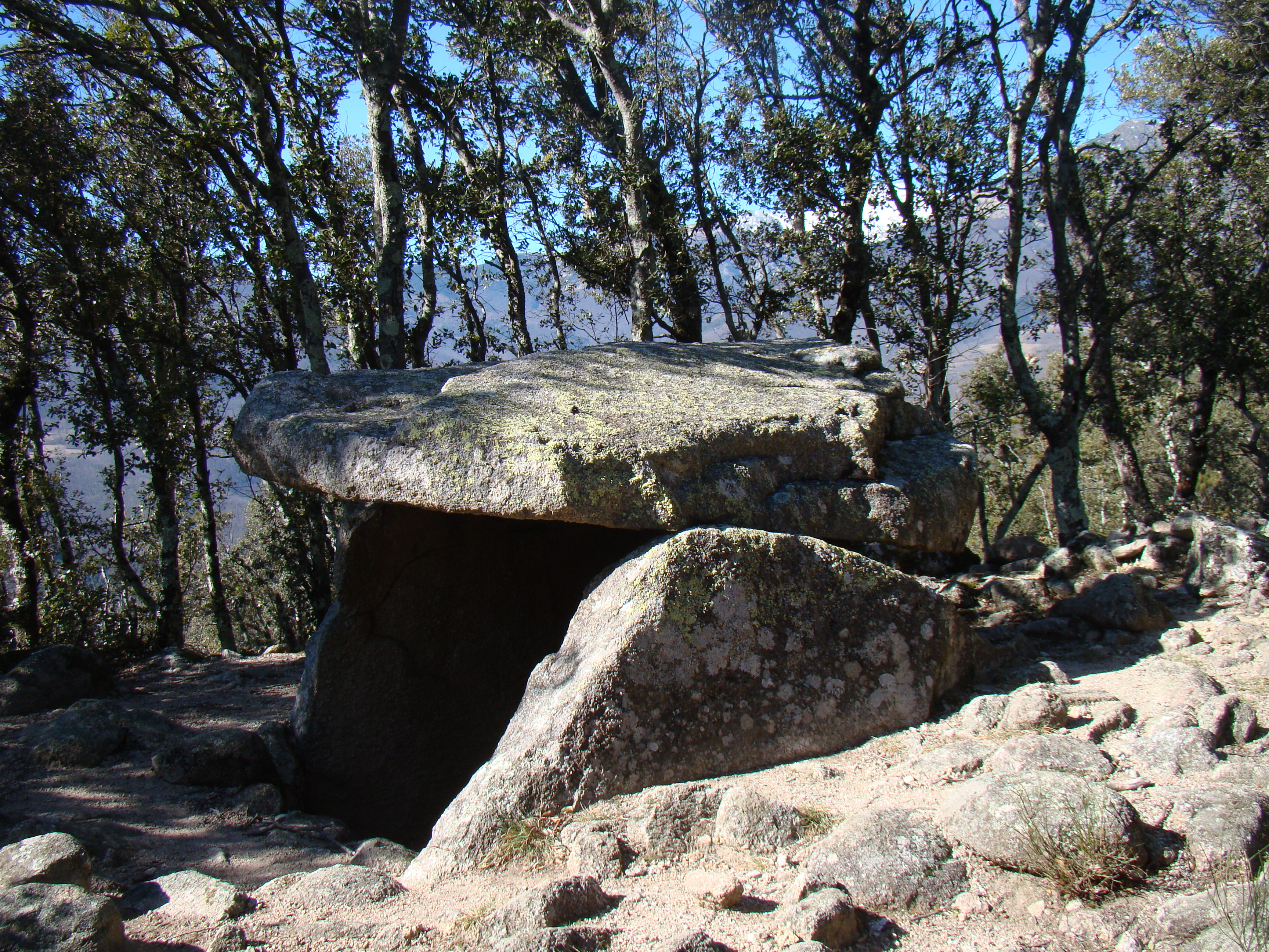 Dolmen Caixa de Rottlan